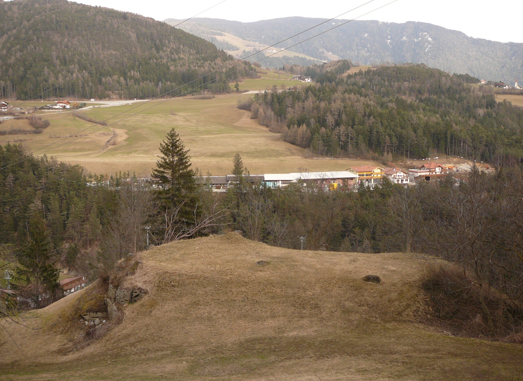 Opera_14.1Sciaves